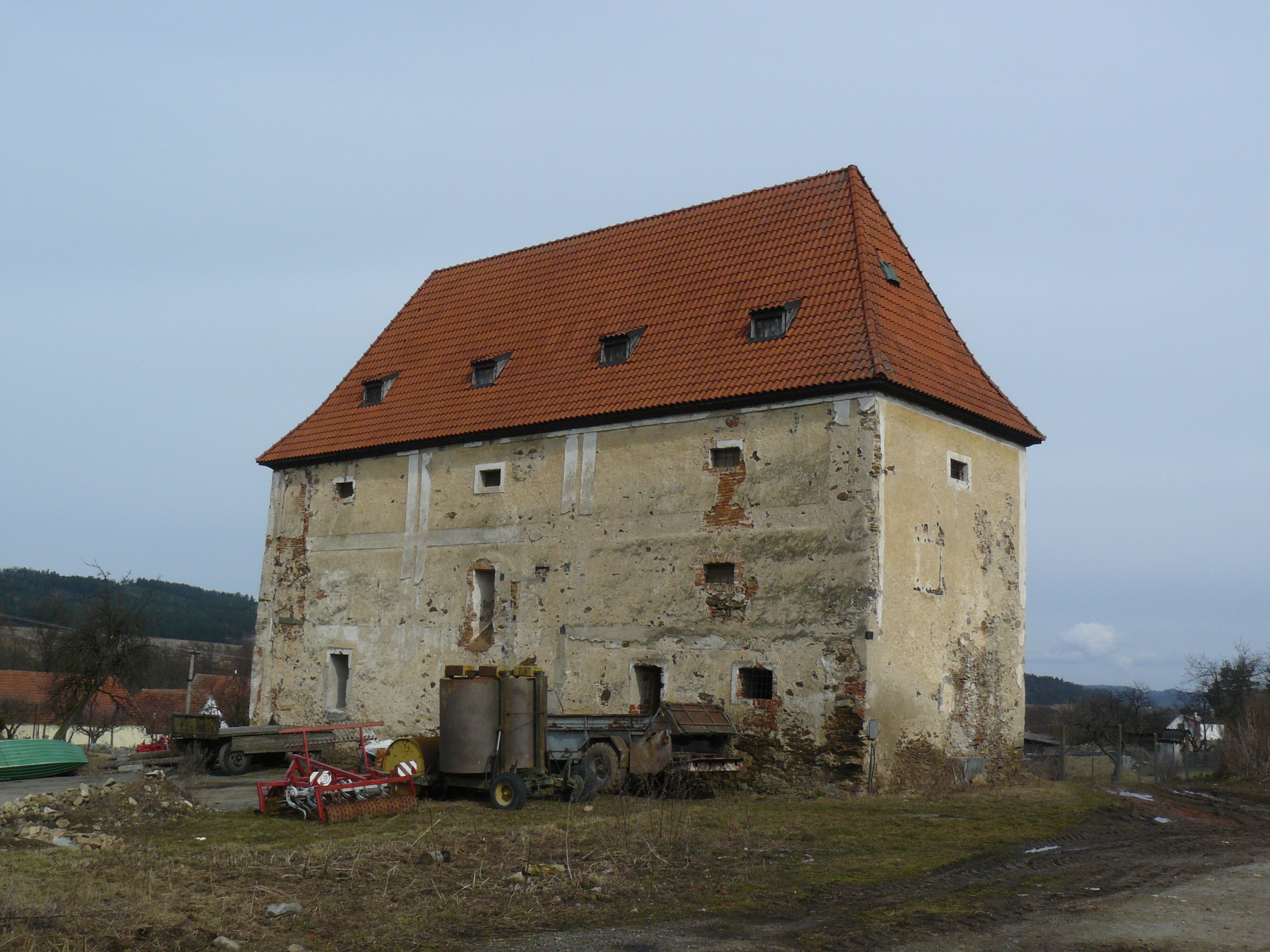 Tvrz, v areálu čp. 29, Budkov, okres Prachatice